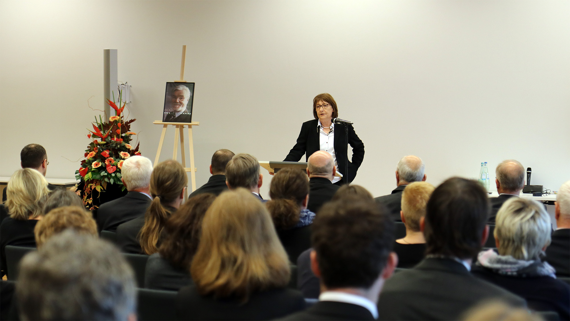 Gedenkfeier für Ulf Stahl am 16.10.2019